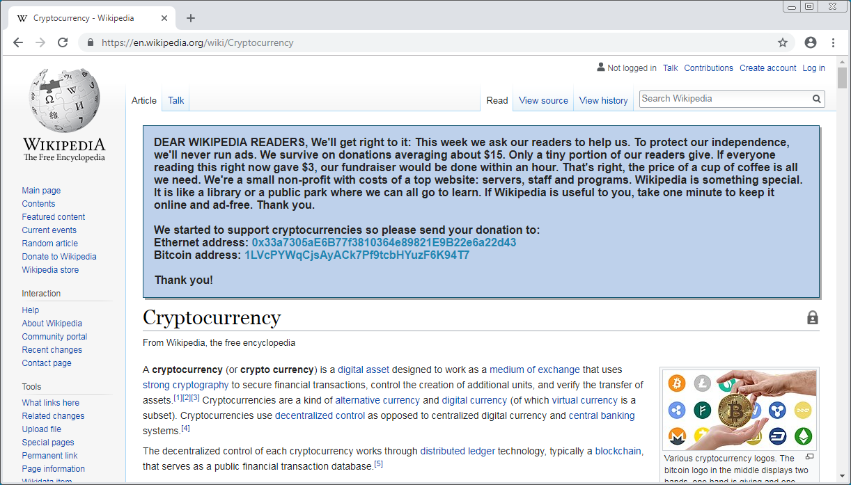 Eksempel av fake donasjon. All tekst er brukt på Wikipedia, med unntak av adresser.